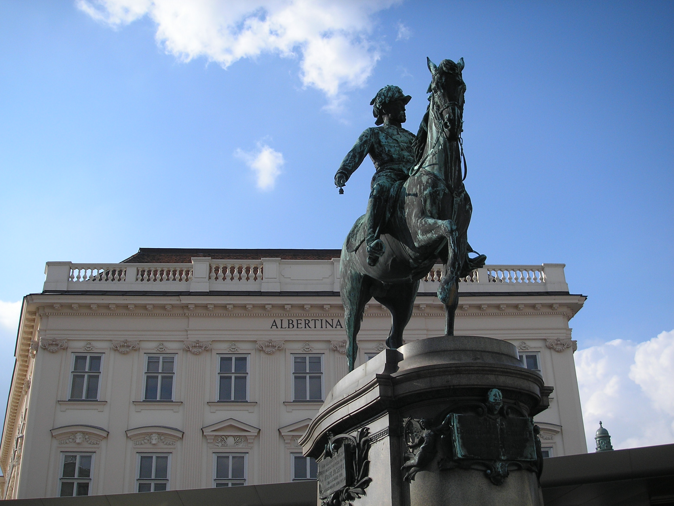 The Albertina, former Palais Erzherzog Albrecht, in Vienna